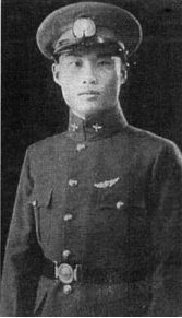 中國空軍李有幹